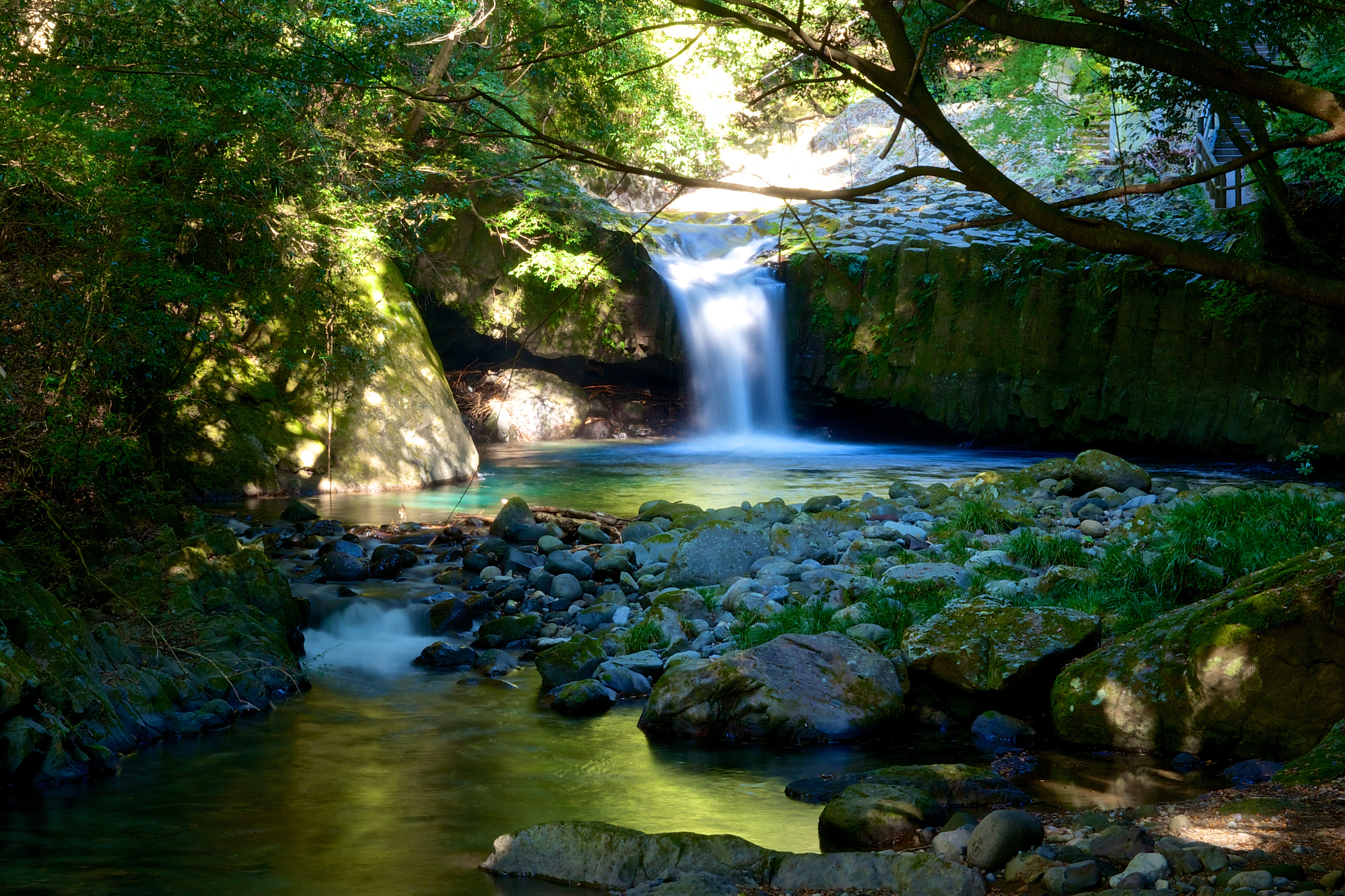 Hebidaru Falls